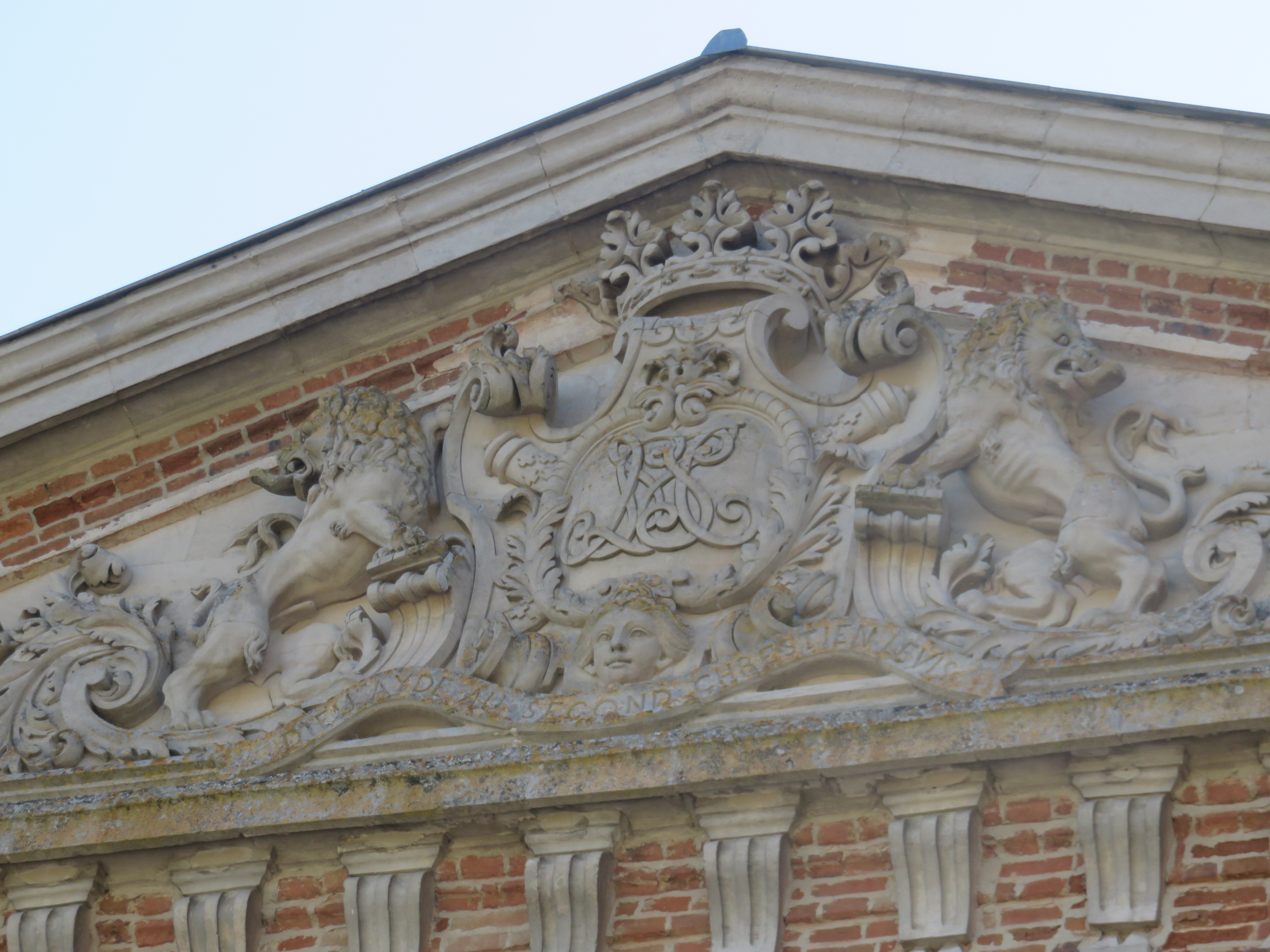 Château de Chèreperrine (61), fronton nord à la gloire de la famille Lévis-Mirepoix. La famille est propriétaire du château depuis la fin du XIX e siècle.